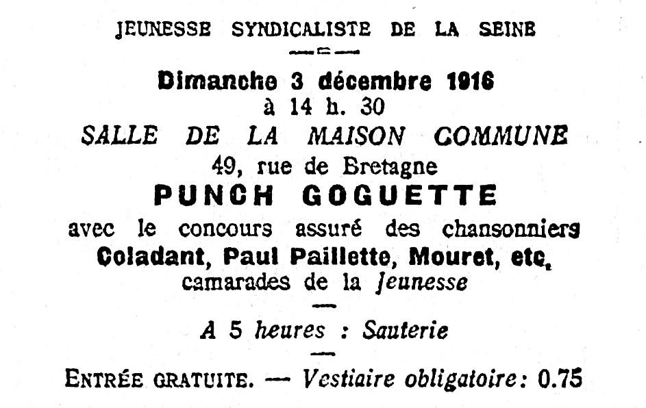 Invitation à un Punch Goguette le 3 décembre 1916.